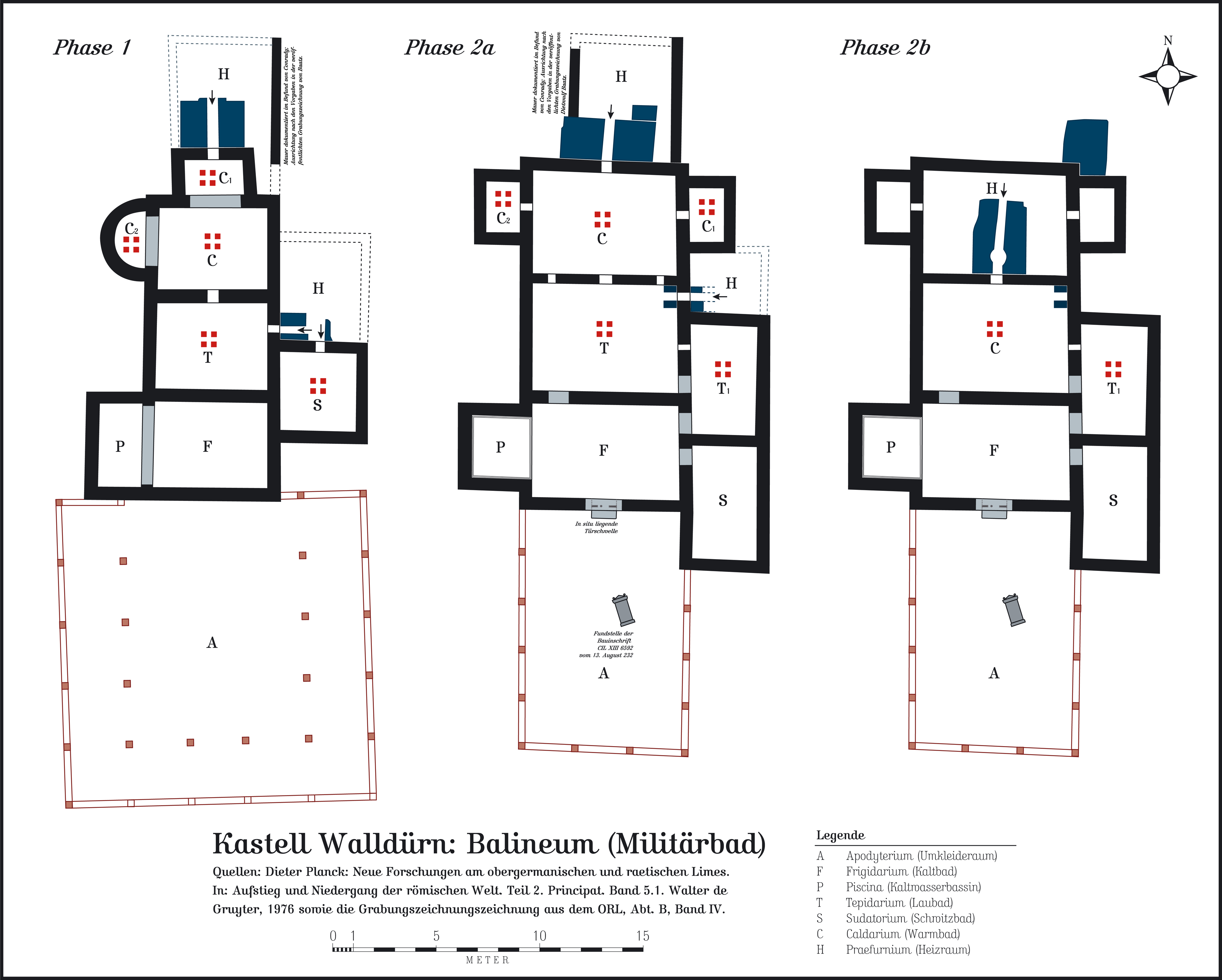 Das Kastellbad Walldürn, 1. Bauphase. Quellenangabe: siehe in der Zeichnung direkt! Die Zeichnung kombiniert die alten Befunde mit den Grabungsergebnissen von Baatz.